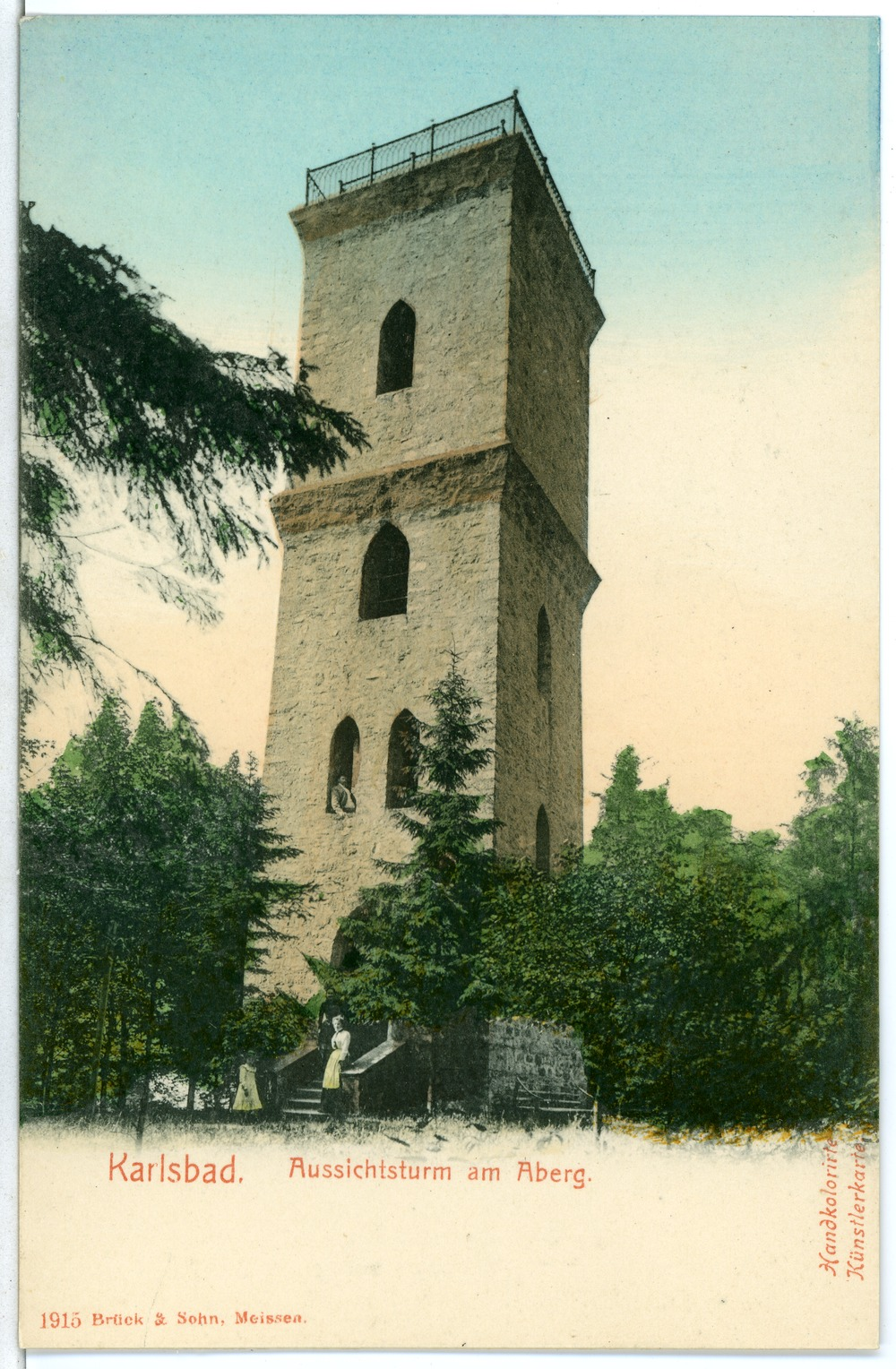 Karlsbad; Aussichtsturm This postcard is from publisher Brück & Sohn in Meißen ( This postcard has a unique number 01915 and is available in a higher resolution at the publisher. This images was uploaded in a cooperation project between Wikipedians and the publisher.